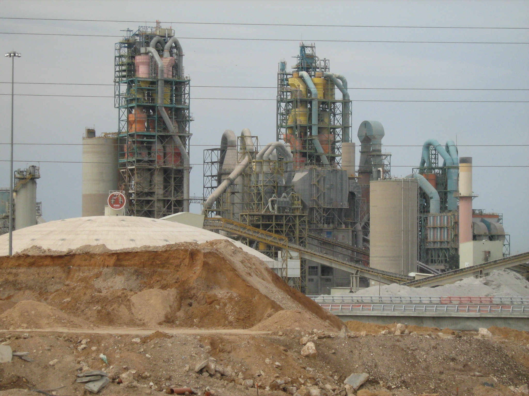 כביש 431 ומפעלי נשר ברמלה